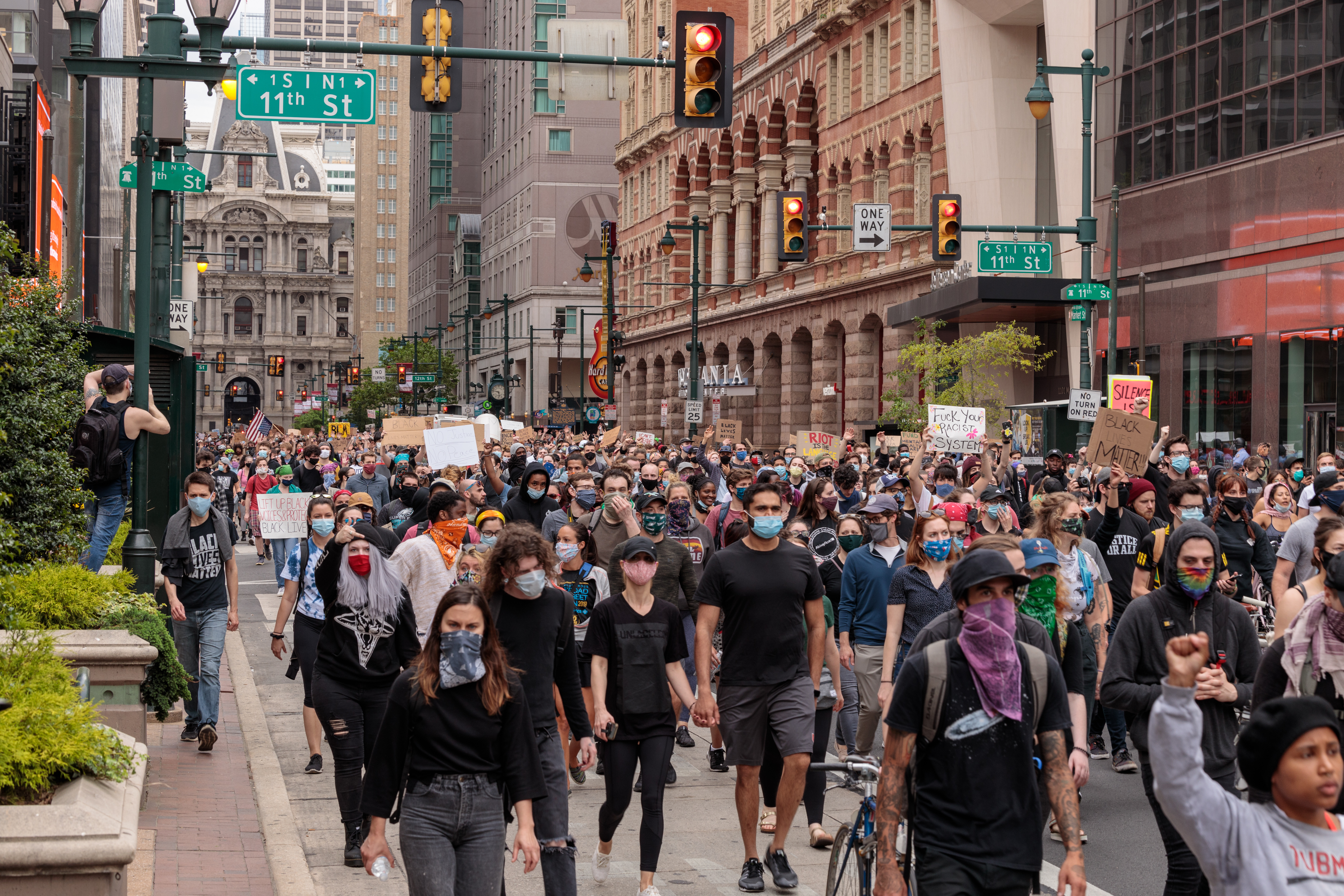 Civil Unrest 2020